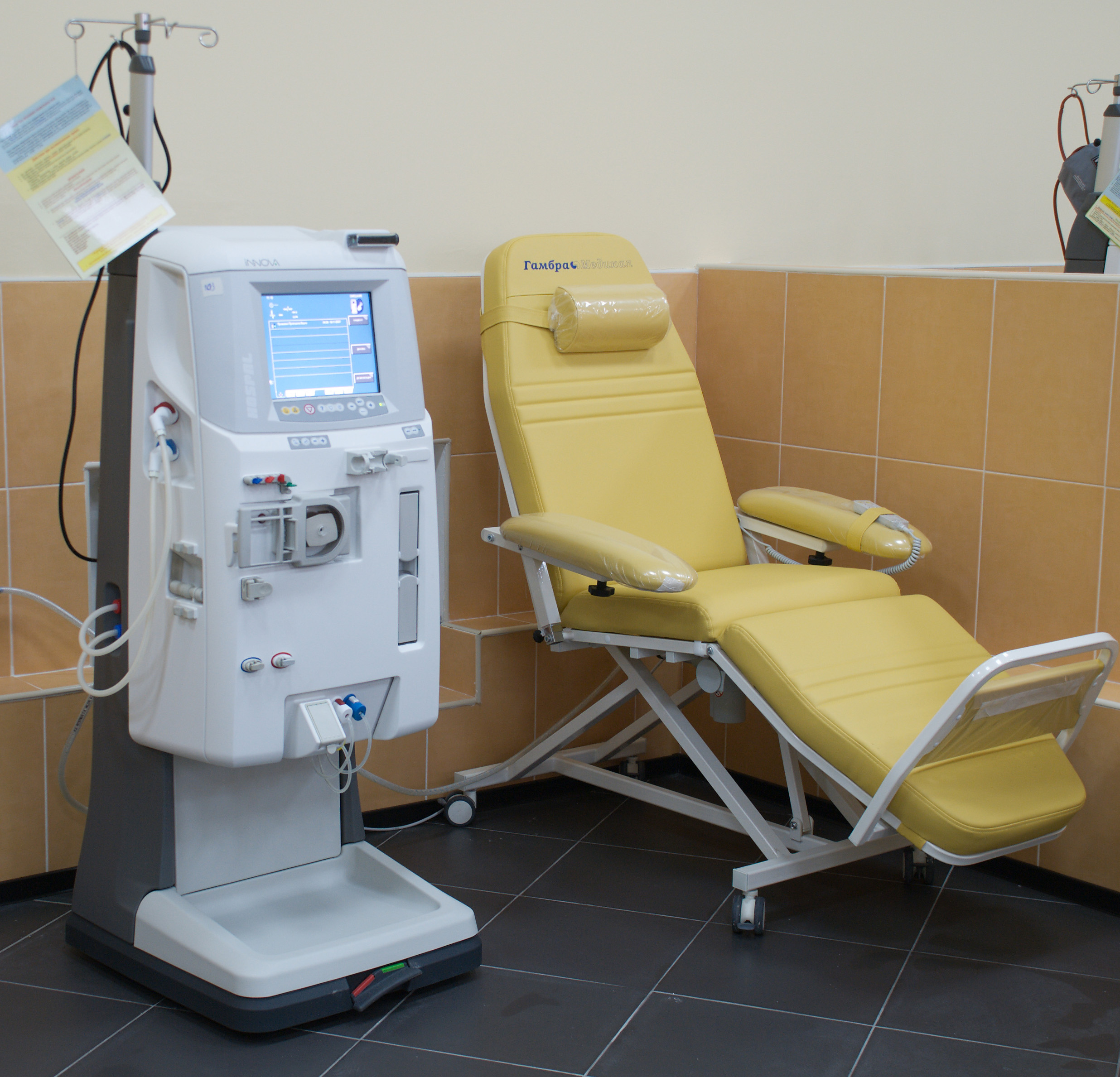 аппарат для гемодиализа INNOVA